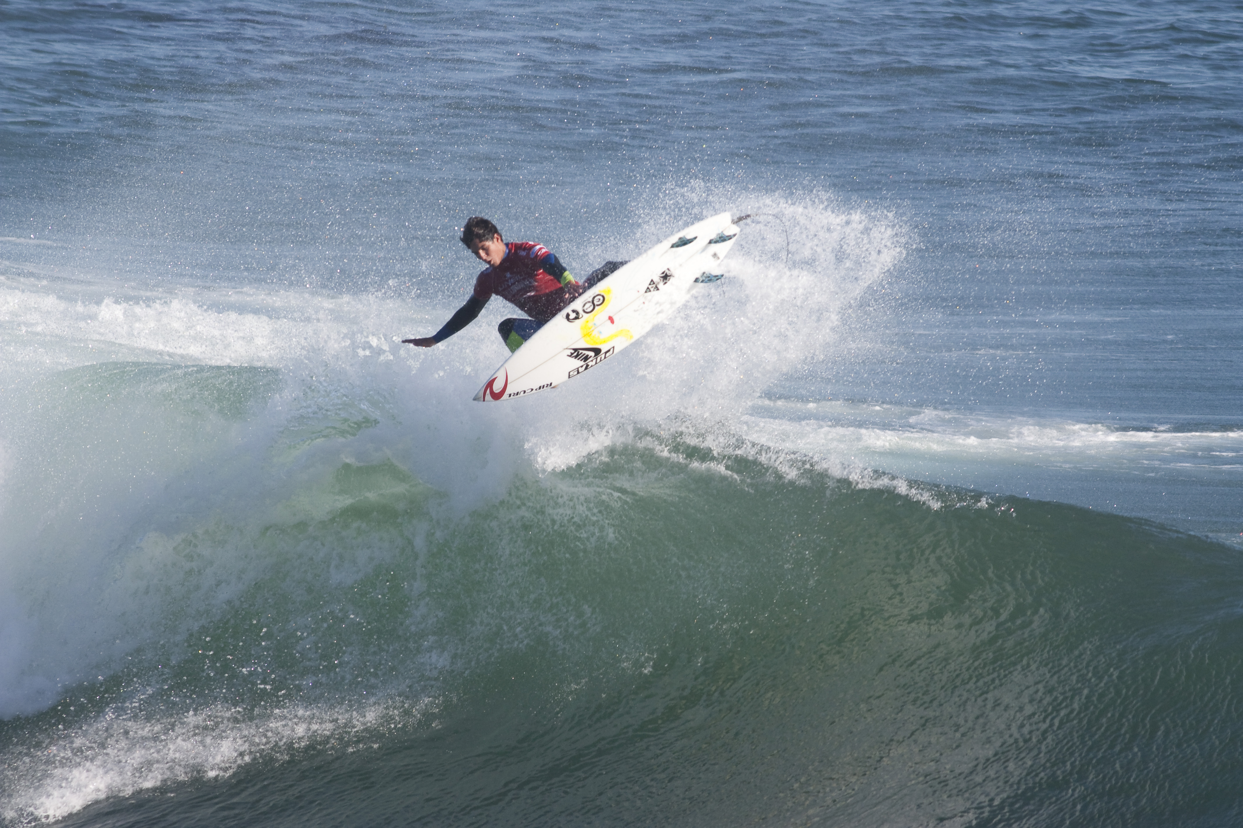 2012 Coldwater Classic; 3rd round